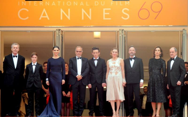 Présentation de "Ma Loute" au festival de Cannes. De gauche à droite, Bruno Dumont, Raph, Juliette Binoche, Fabrice Luchini, Brandon Lavieville, Valeria Bruni Tedeschi et Jean-Luc Vincent. A leur droite : la ministre de la culture Audrey Azoulay et le président du Festival de Cannes Pierre Lescure.